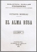 El Alma rusa, traduction espagnole d'articles d'Octave Mirbeau (1848-1917)